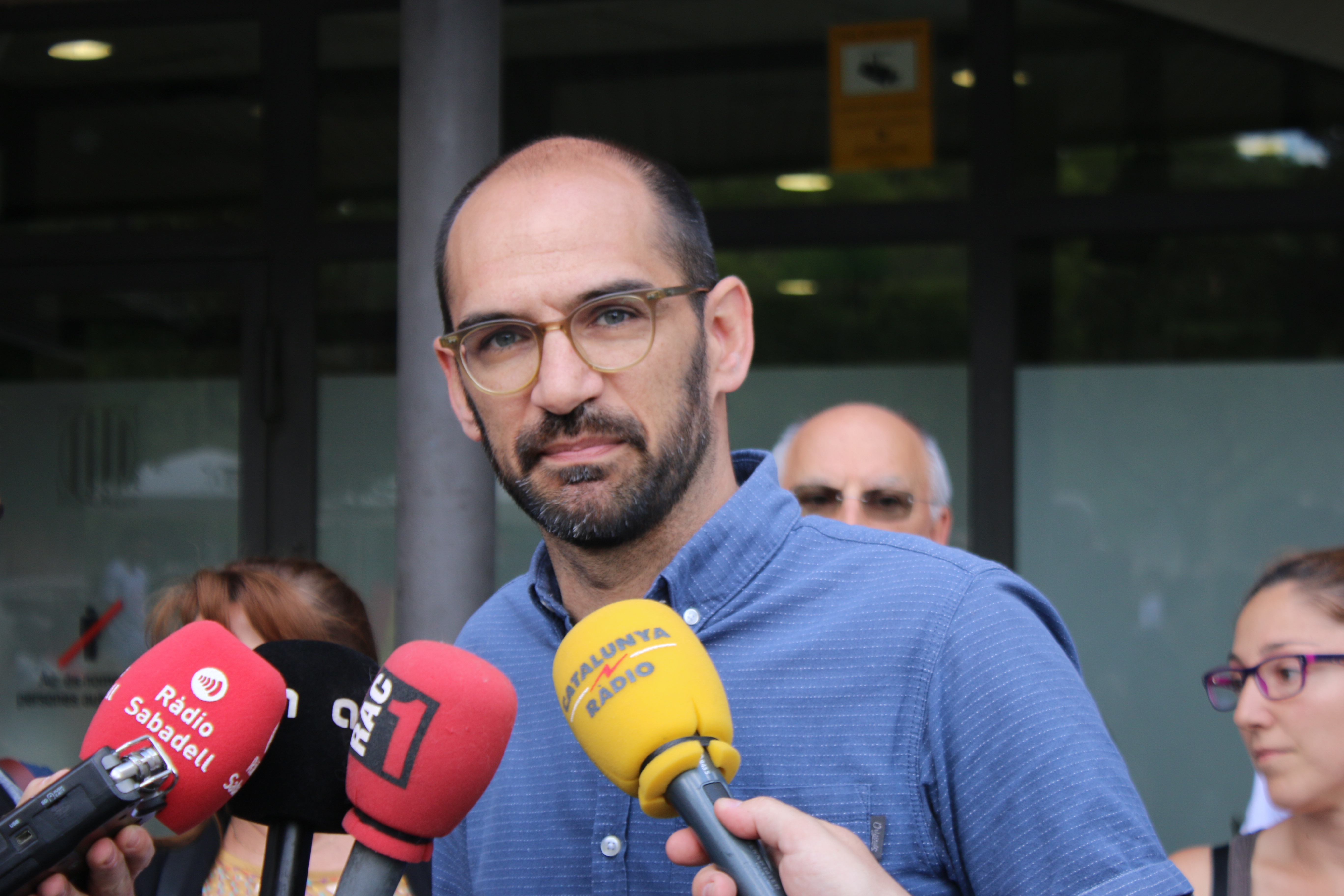 L'alcalde Maties Serracant abans de declarar als Jutjats de Sabadell per la querella interposada per SMATSA per obstaculitzar la fiscalització iniciada per l'Ajuntament de Sabadell.